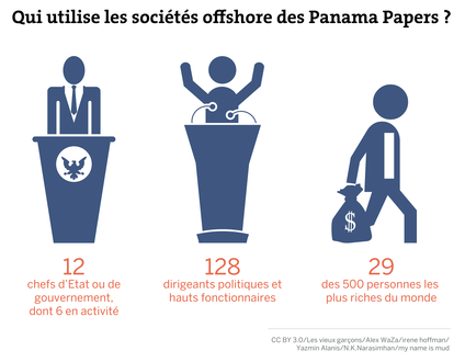 Infographie publiée sur le site Internet du quotidien Le Monde, montrant une partie des personnes concernées par les révélations de la fuite de documents « Panama Papers » (version mondiale, ne mentionnant pas les personnes concernées en France).